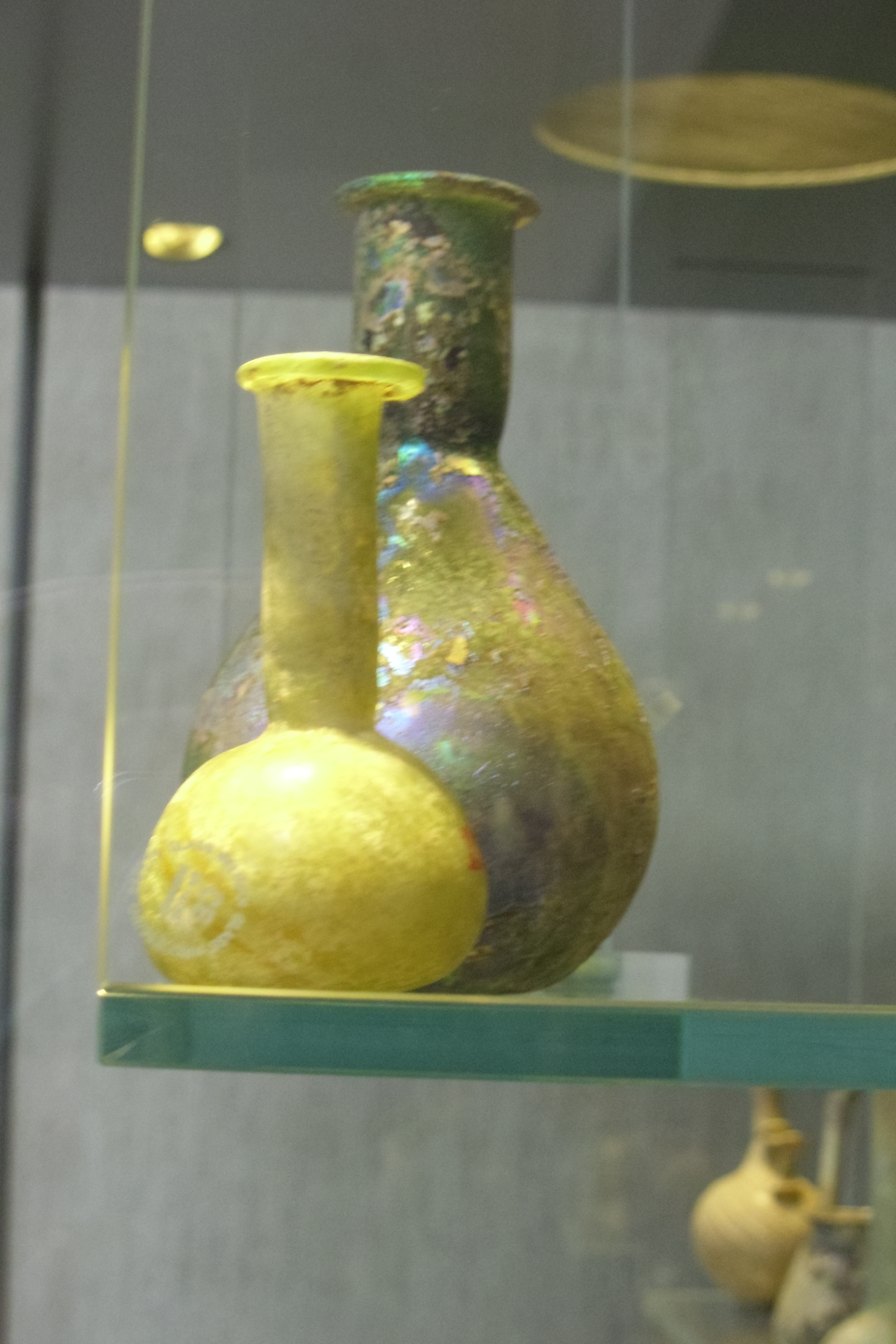 Balsamaires en verre soufflé. Ier - IIe s. This is a file created at the museum: Musée royal de Mariemont in Morlanwelz